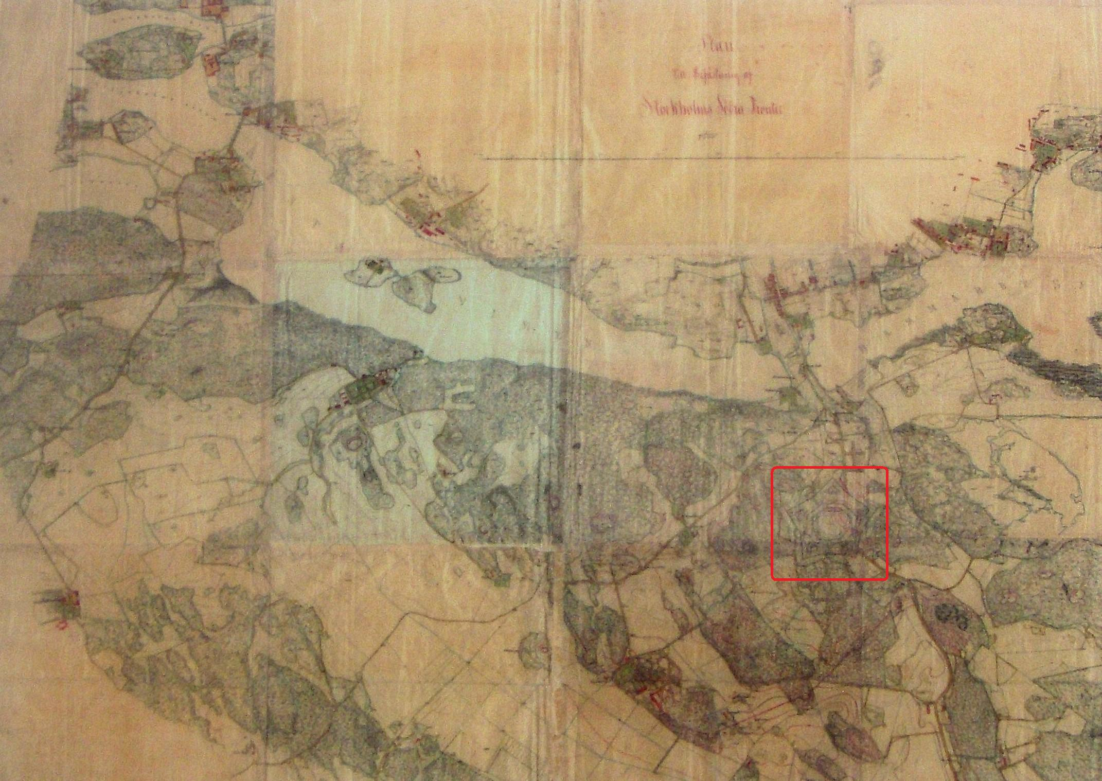 Johanneshovs skans, Stockholm, karta på området